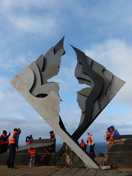 Restauriertes Denkmal im Oktober 2015